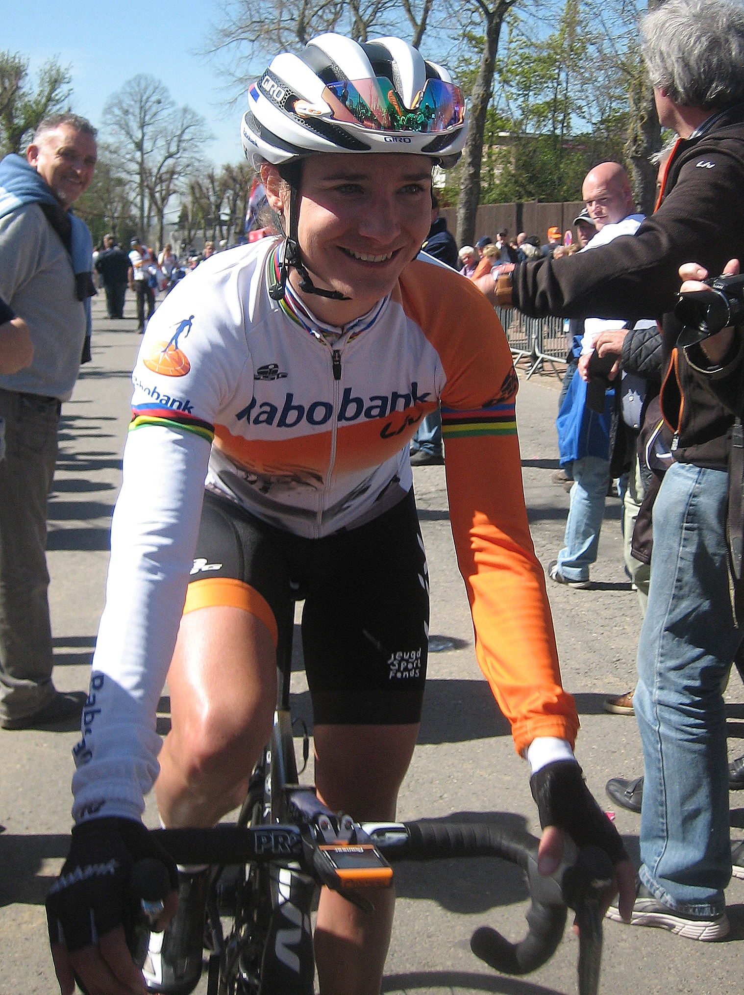 Marianne Vos (Rabo-Liv) na finish Waalse Pijl 2016